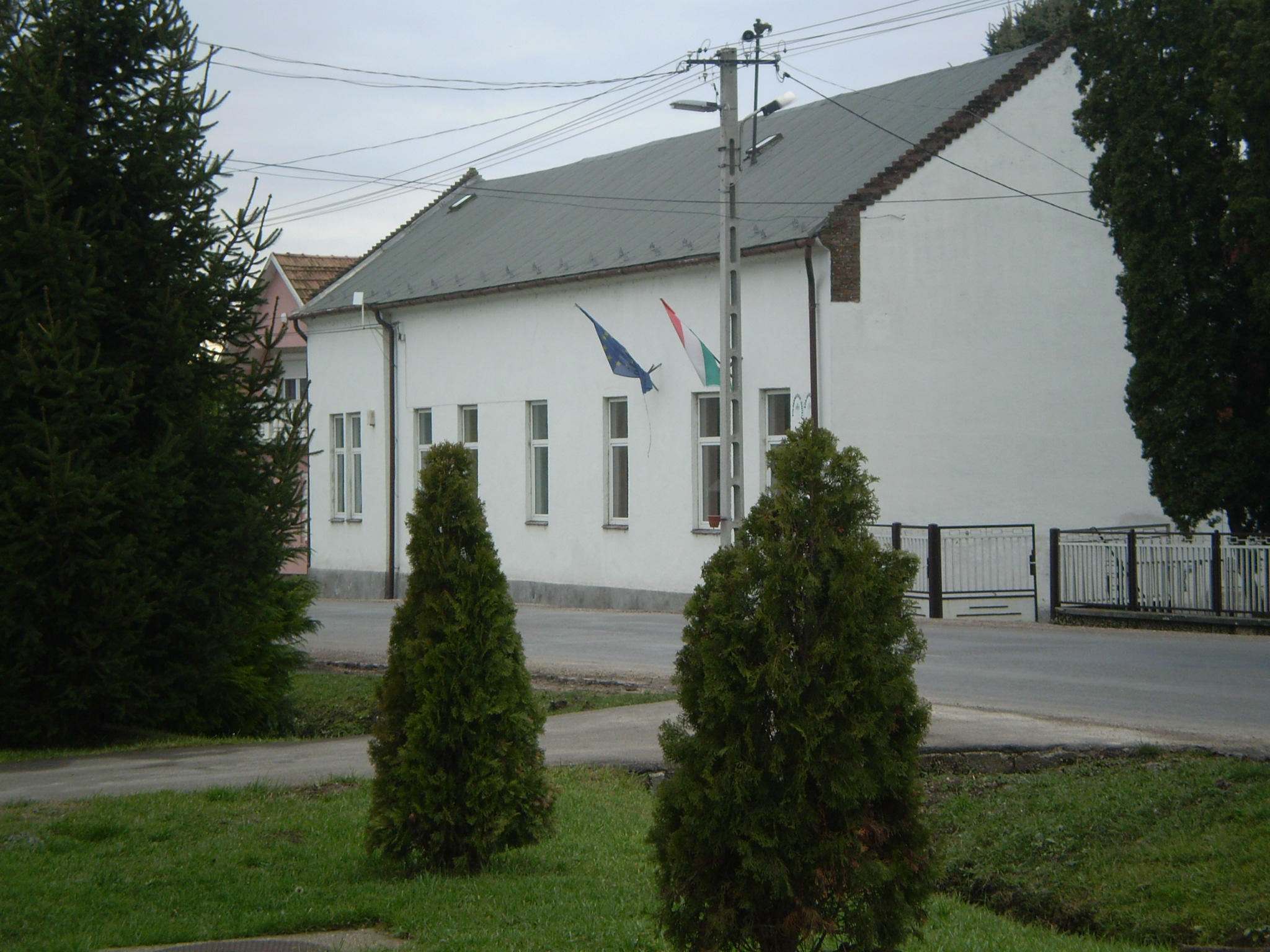 A Polgármesteri Hivatal és a Körjegyzőség közös épülete Baksán (Petőfi u. 5.)